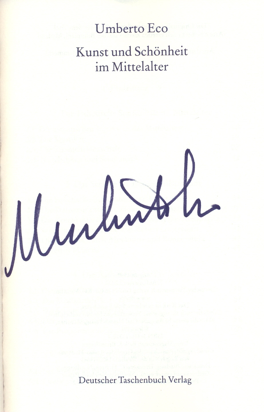 Autogramm von Umberto Eco